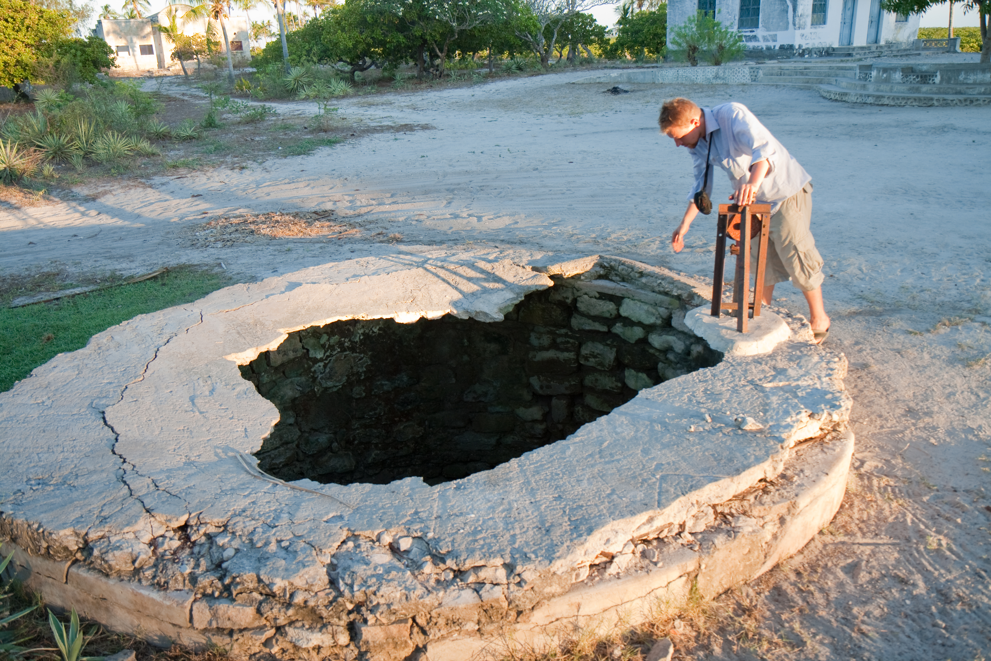 Well of Vasco da Gama in Mozambique.